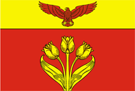 Герб городского поселения Палласовка